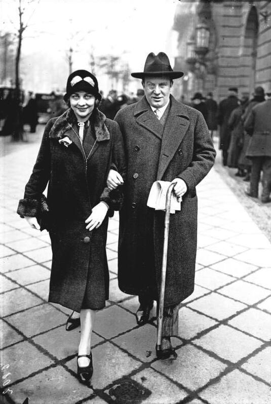 Der berühmte Kammersänger Richard Tauber läßt sich scheiden! Der berühmte Kammesänger Richard Tauber hat die Scheidung seiner Ehe mit der Sängerin Charlotte Tauber-Vanconti beantragt. Letzte Aufnahme des Ehepaares Tauber.